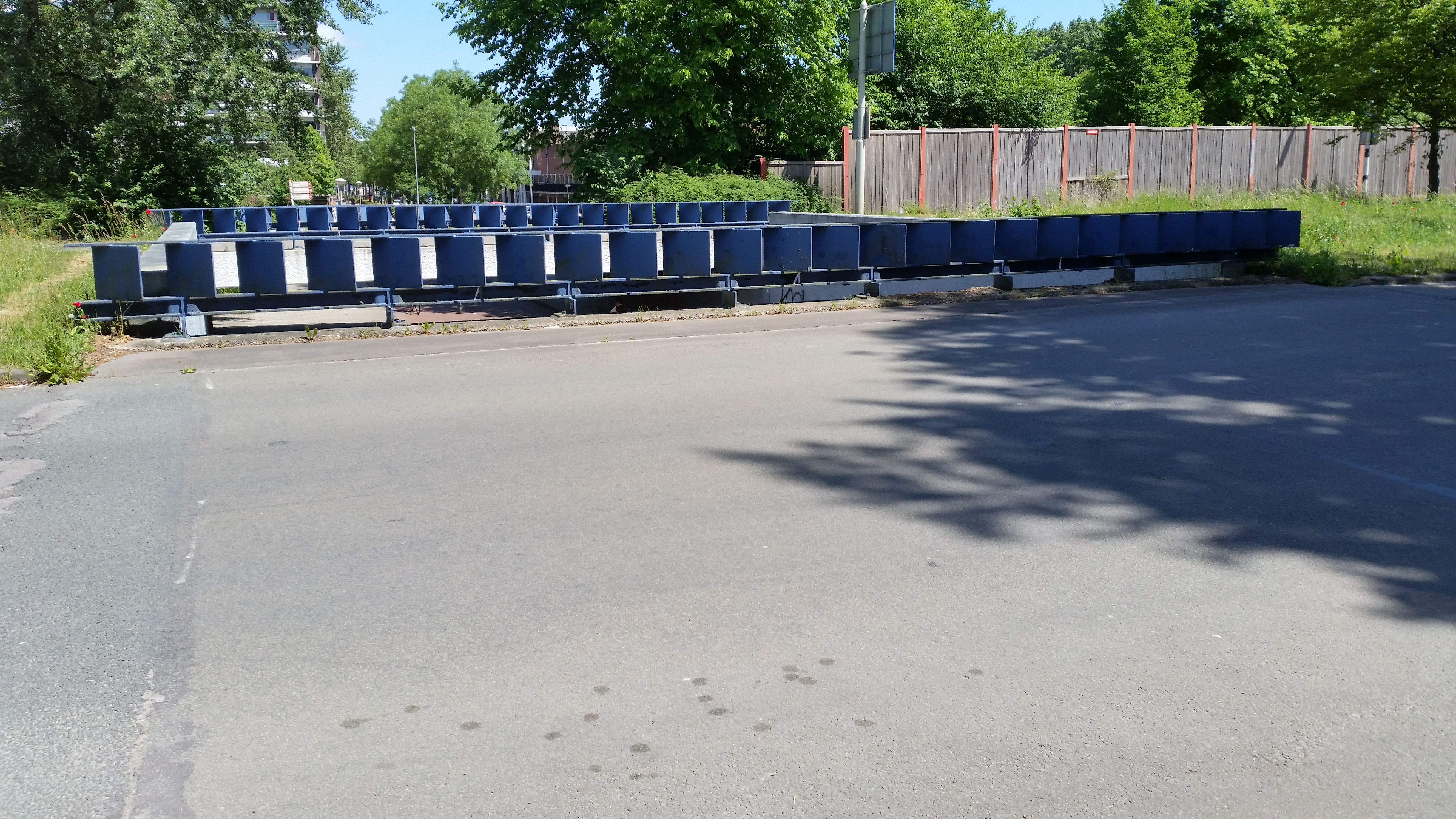 Impressie van brug 934 in de Nieuwe Purmerweg, Amsterdam-Noord